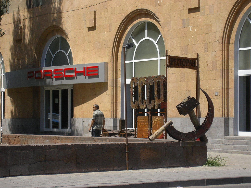 Erevan, entre marxisme et capitalisme